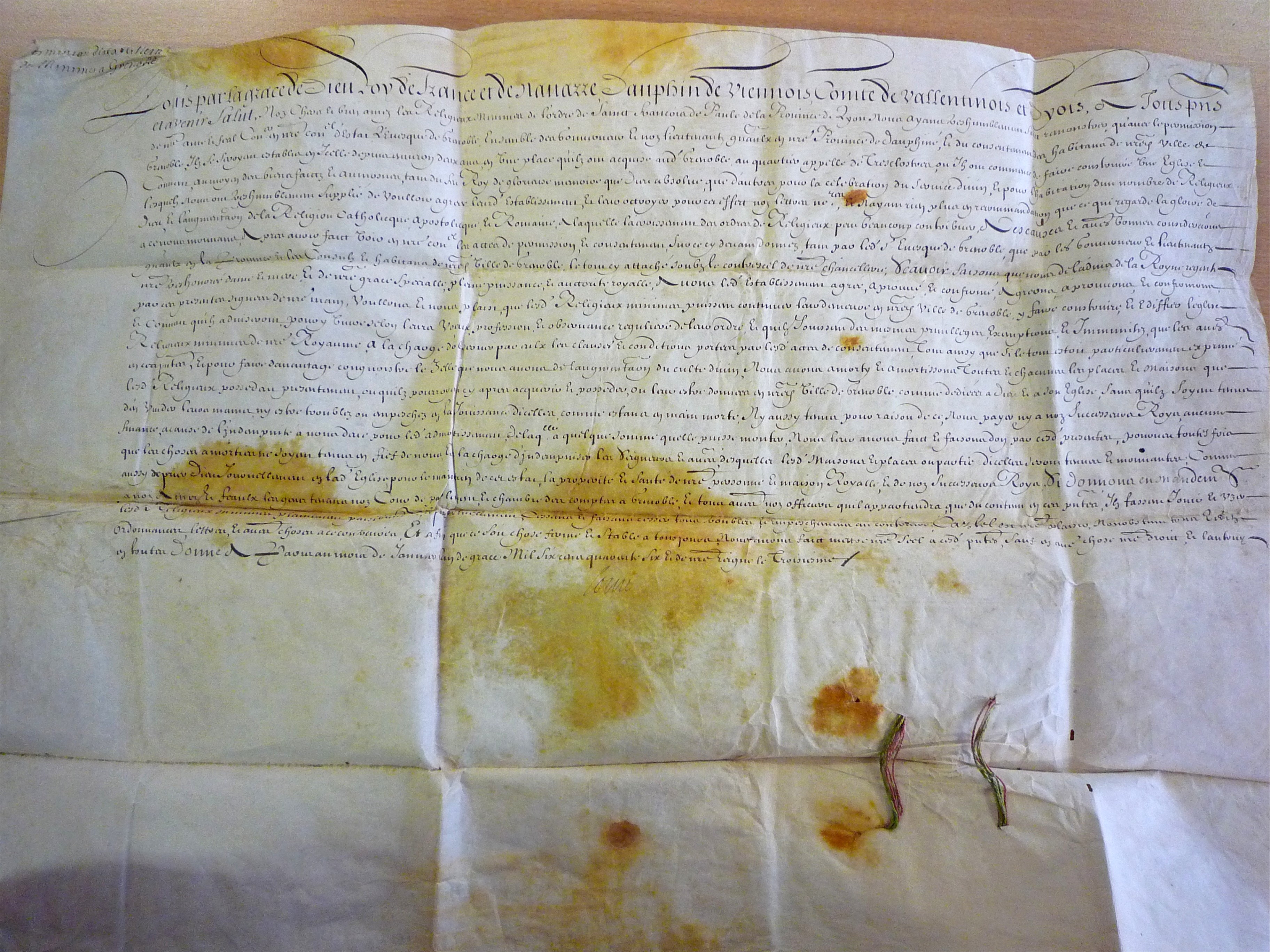 Lettre patente signée par Louis XIV en 1646 pour l'installation du Couvent des Minimes à Grenoble. (Archives départementales de l'Isère)